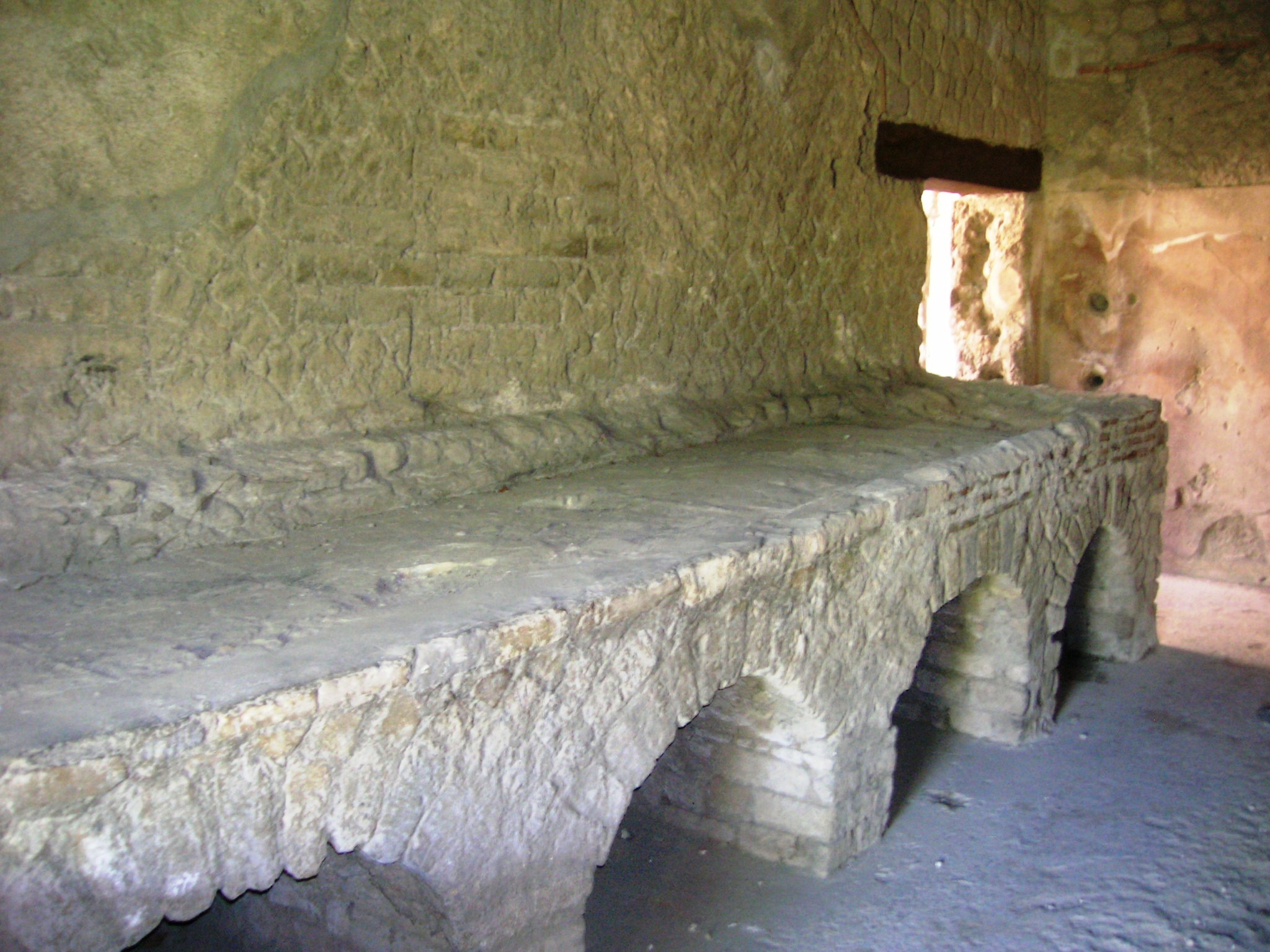 Villa San Marco, villa d'otium di Stabiae, a Castellammare di Stabia